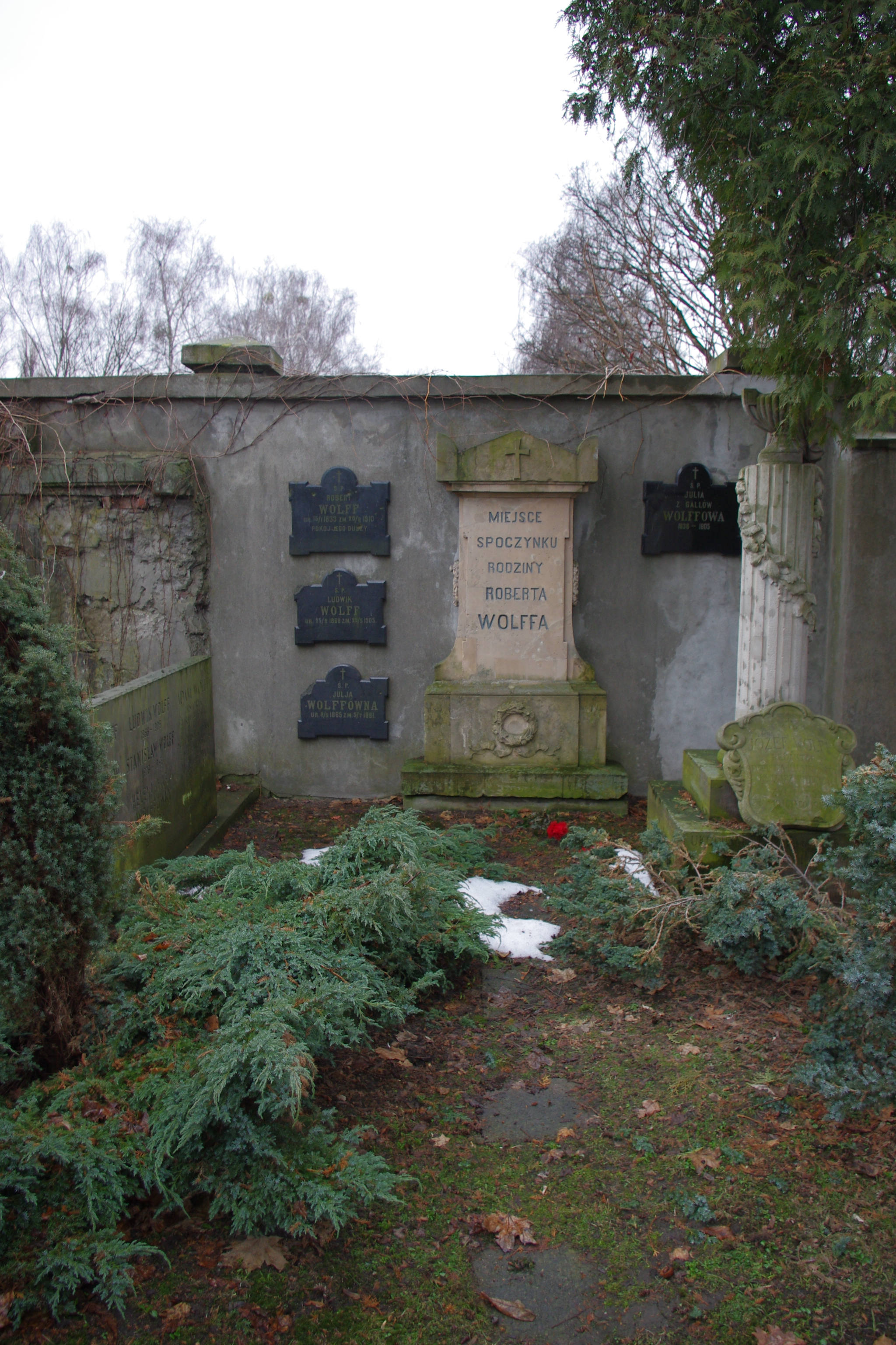 Grób historyka Adama Wolffa oraz wydawców Augusta Roberta Wolffa i Józefa Agusta Wolffa na cmentarzu ewangelicko-augsburskim w Warszawie (aleja F gr. 42)